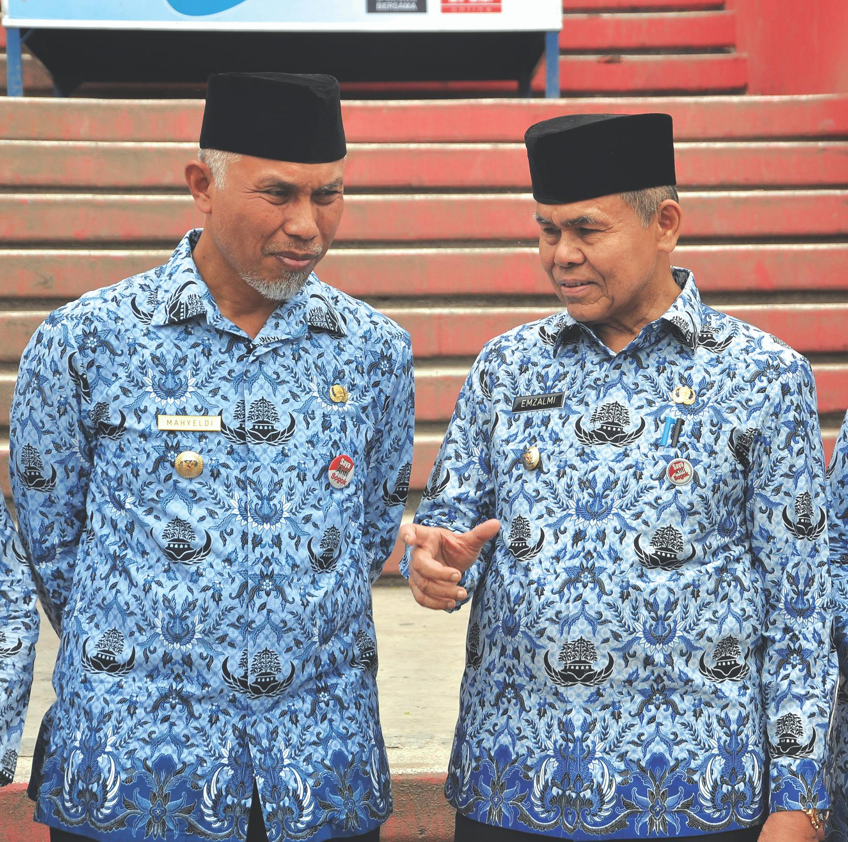 Mahyeldi mendengarkan Emzalmi